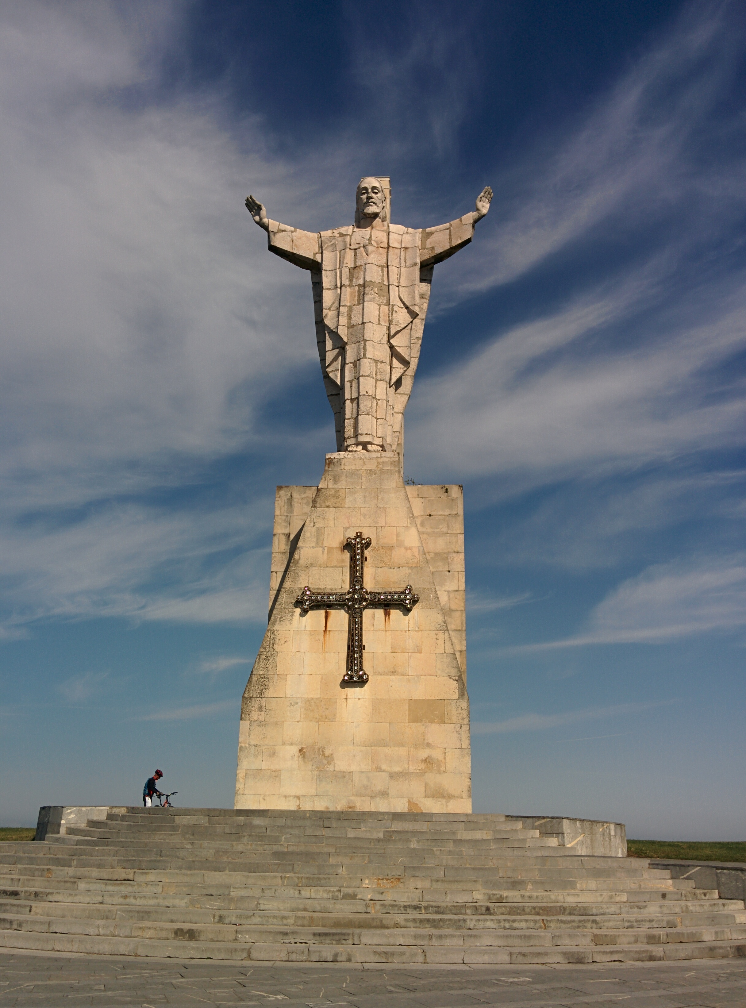 Monumento al Sagrado Corazón de Jesús, en Oviedo (España).